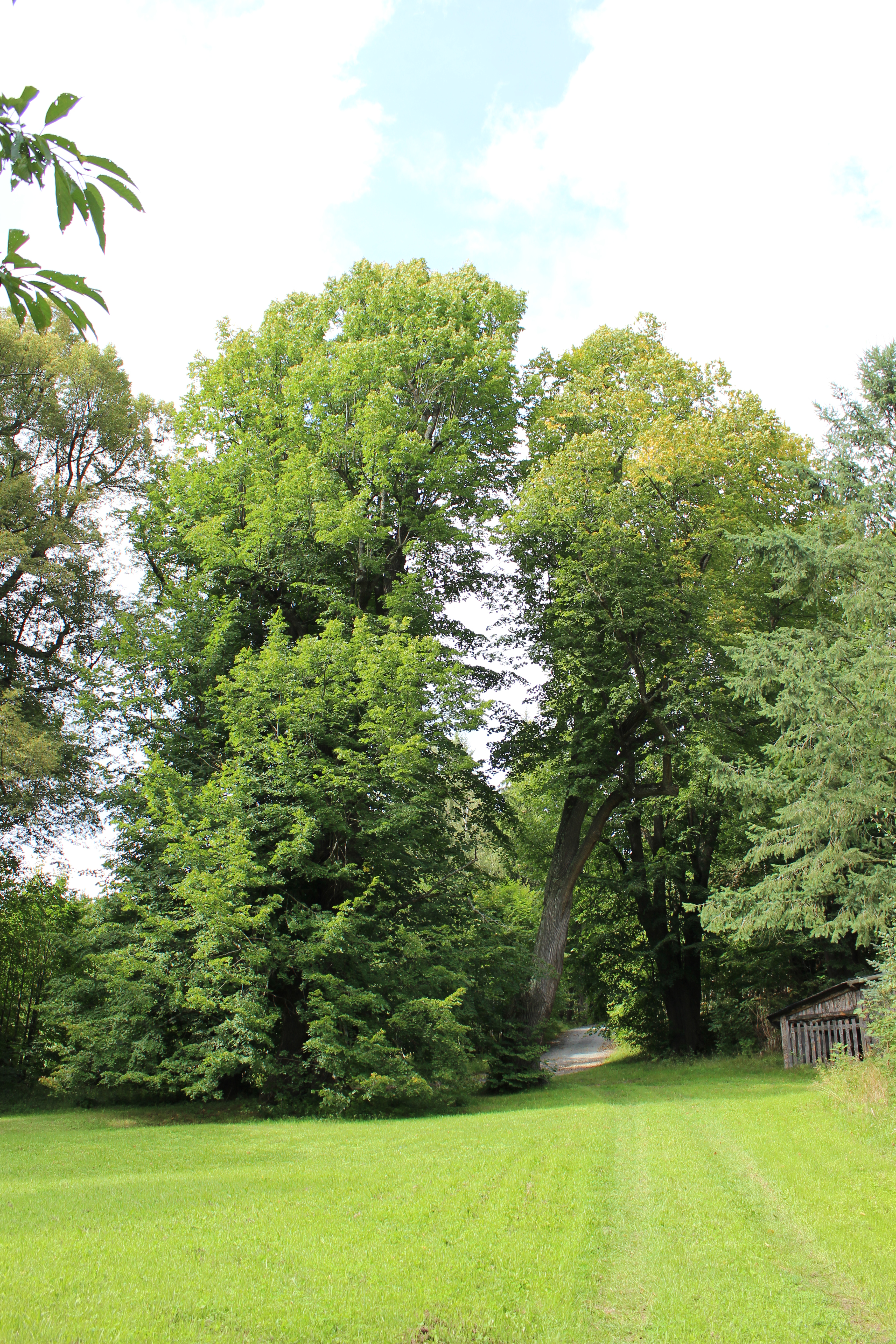 Památné lipové stromořadí v Dolejším Krušci. Project: Chráněná území.